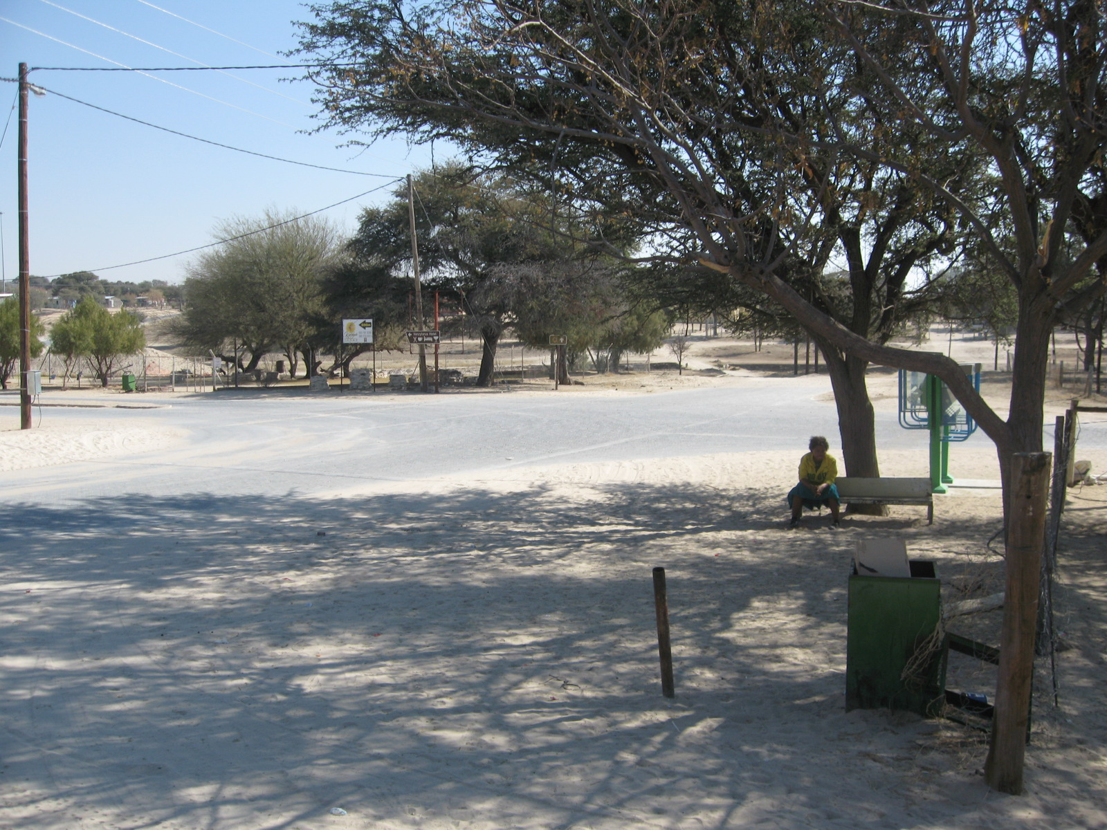 Van Zylsrus